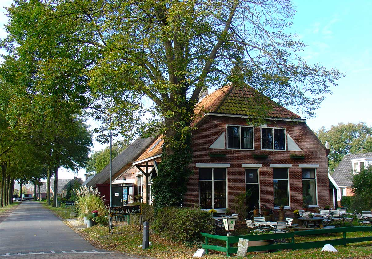 Amen met café De Amer